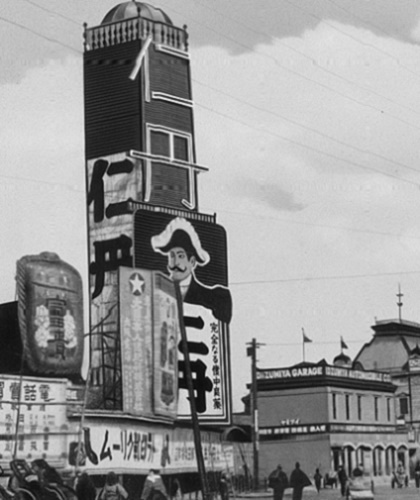 明治40年の大阪駅前の仁丹広告塔。